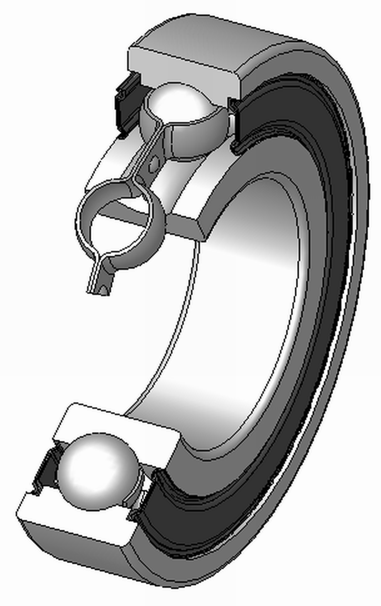 Rillenkugellager, mit beidseitigen Dichtscheiben (Nachsetzzeichen 2RS), genietetem Blechkaefig aus Stahl, im Schnitt, Hinweis: Innenaufbau des Lagers (insbesondere des Kaefigs) variiert je nach Hersteller und Baugroesse rolling contact bearings